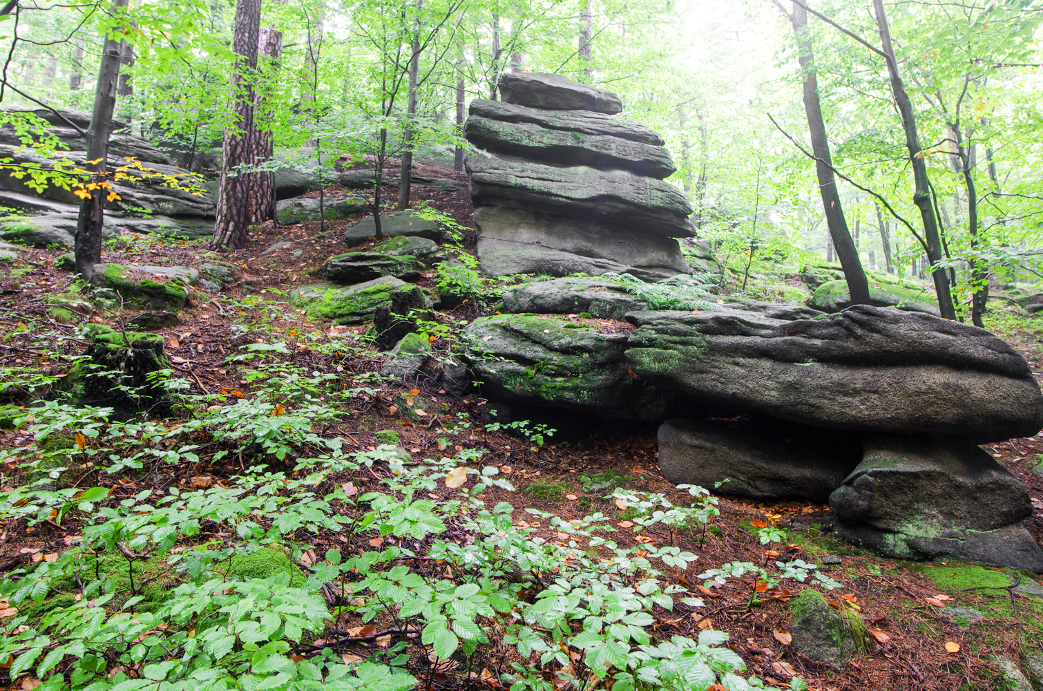 Národní přírodní památka Borový, na Borovém vrchu u Žulové, okres Jeseník